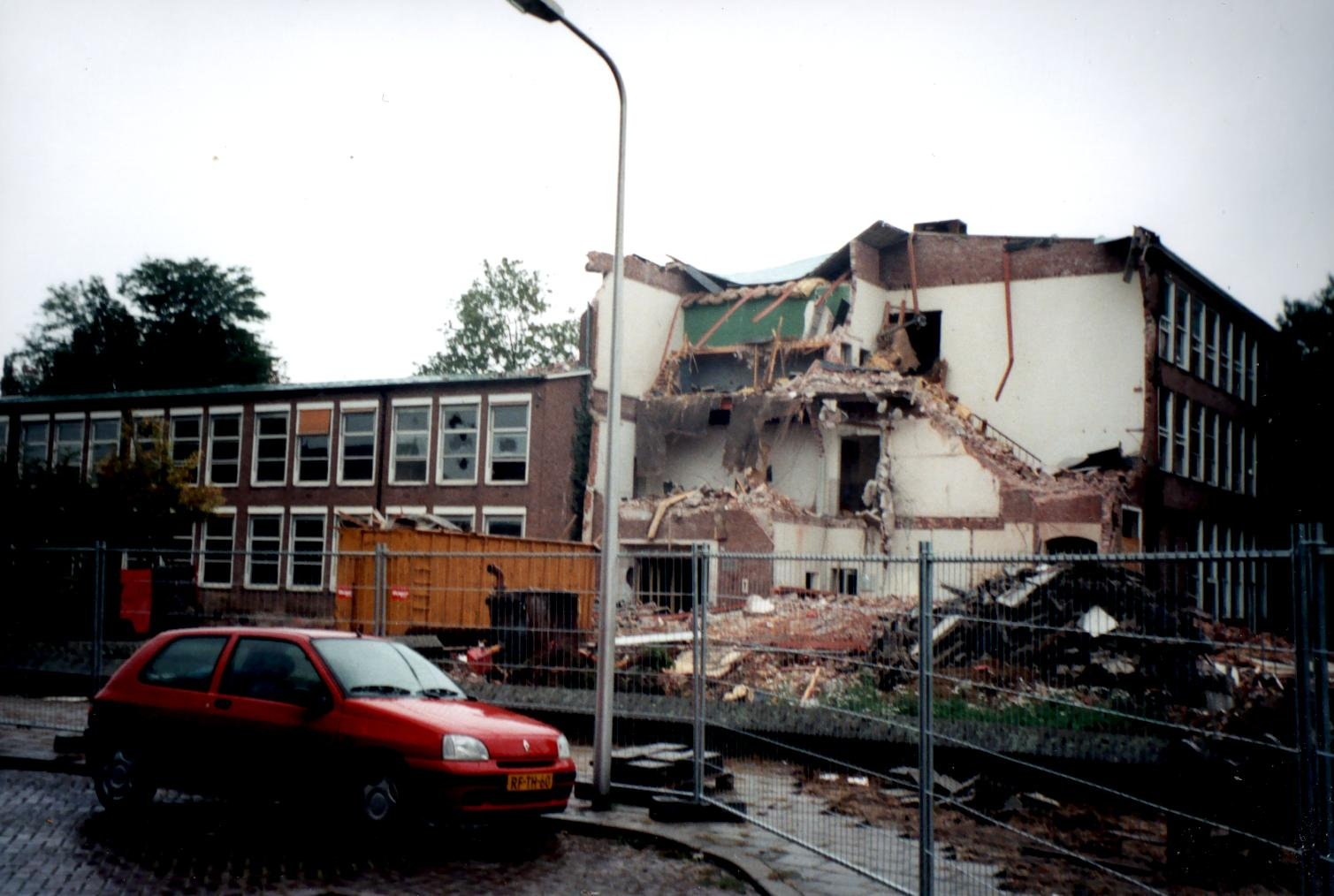 Zutphen, sloop stedelijk lyceum aan de Isendoornstraat in Zutphen. Foto: MJJ van den Akker.